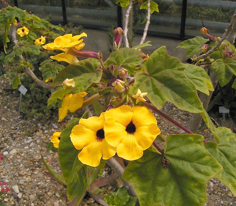 Uncarina decaryi